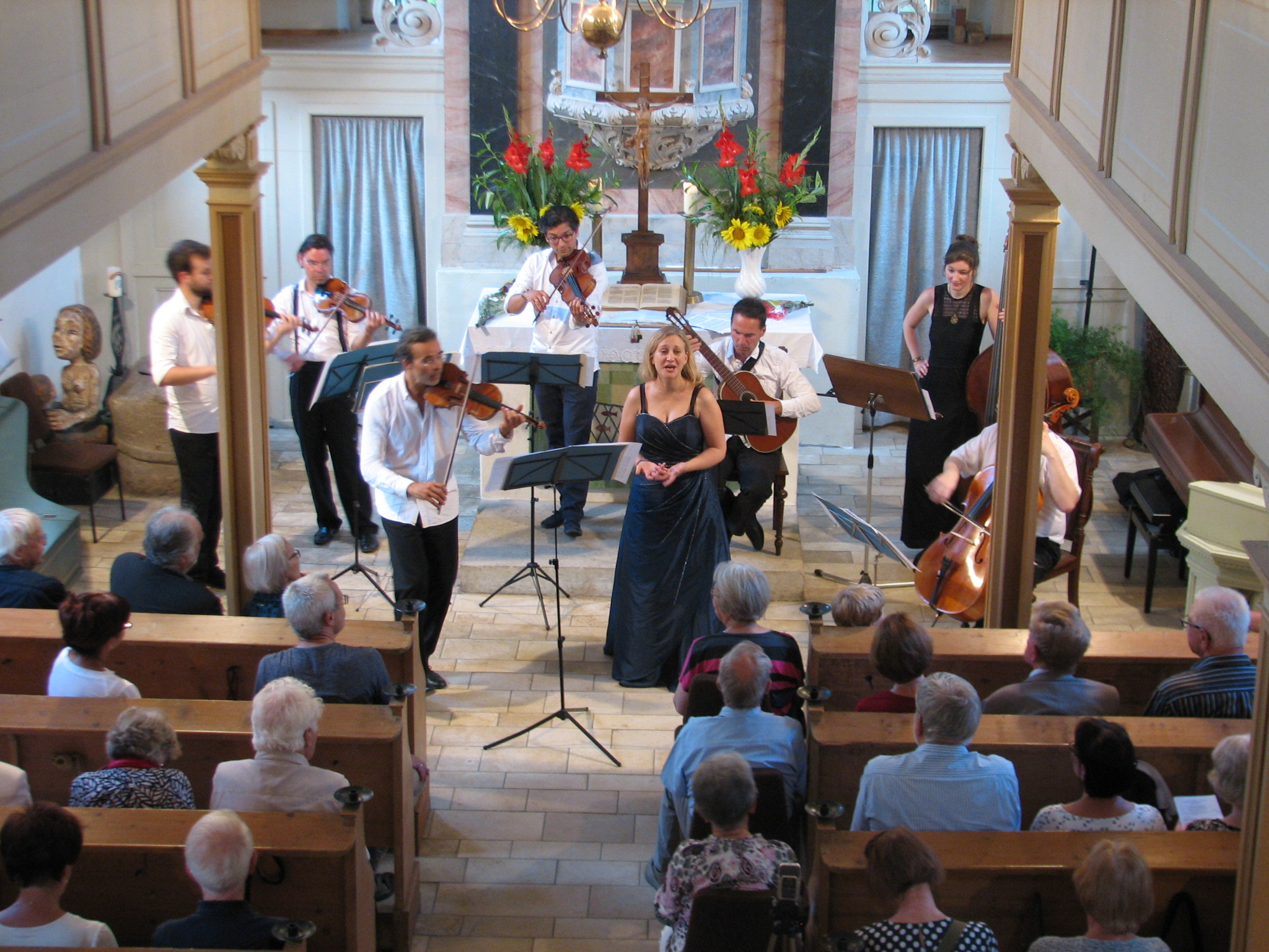 Konzert in vollbesetzter Kirche: Ensemble arcum tendere lipsiense und Sopranistin Verena Küllmer am 22. Juli 2018 in Panitzsch